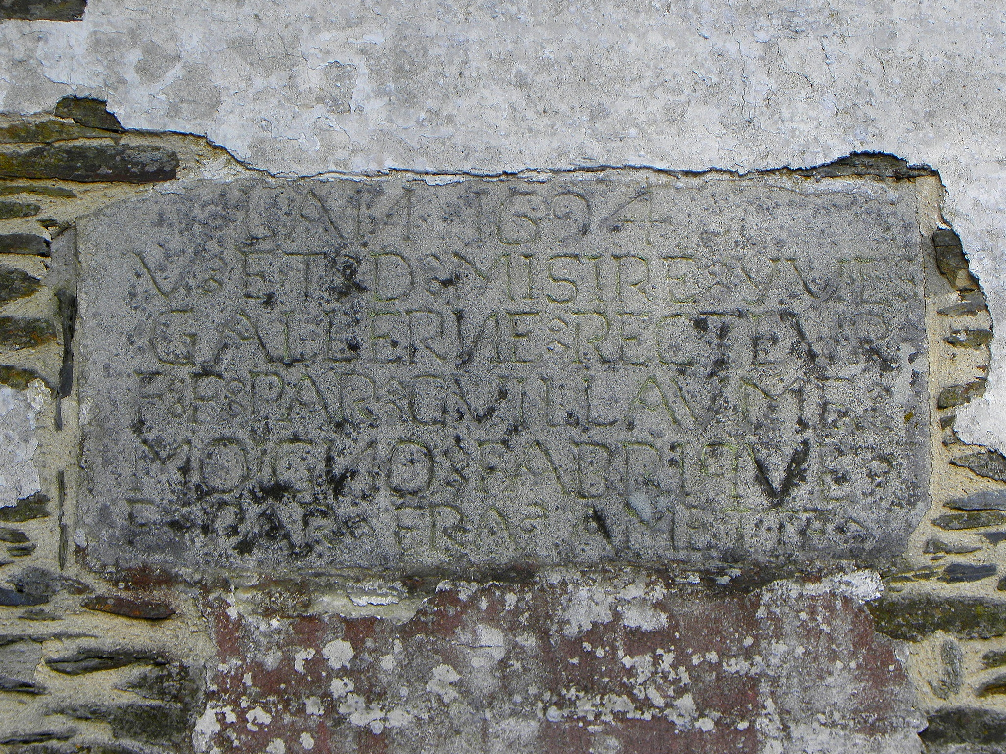 Chapelle Sainte-Suzanne de Mûr-de-Bretagne (22). Inscription au chevet.